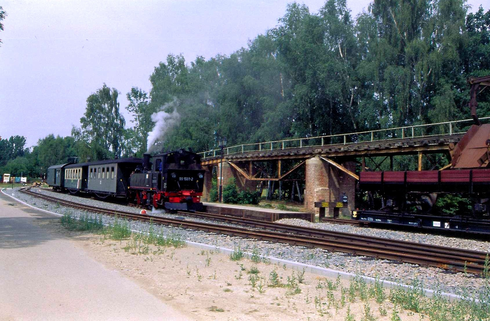 Bahnhof Glossen 2006